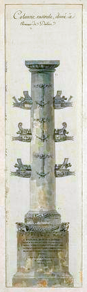 Restitution de la colonne rostrale de Caius Duilius, XVIIIème siècle.